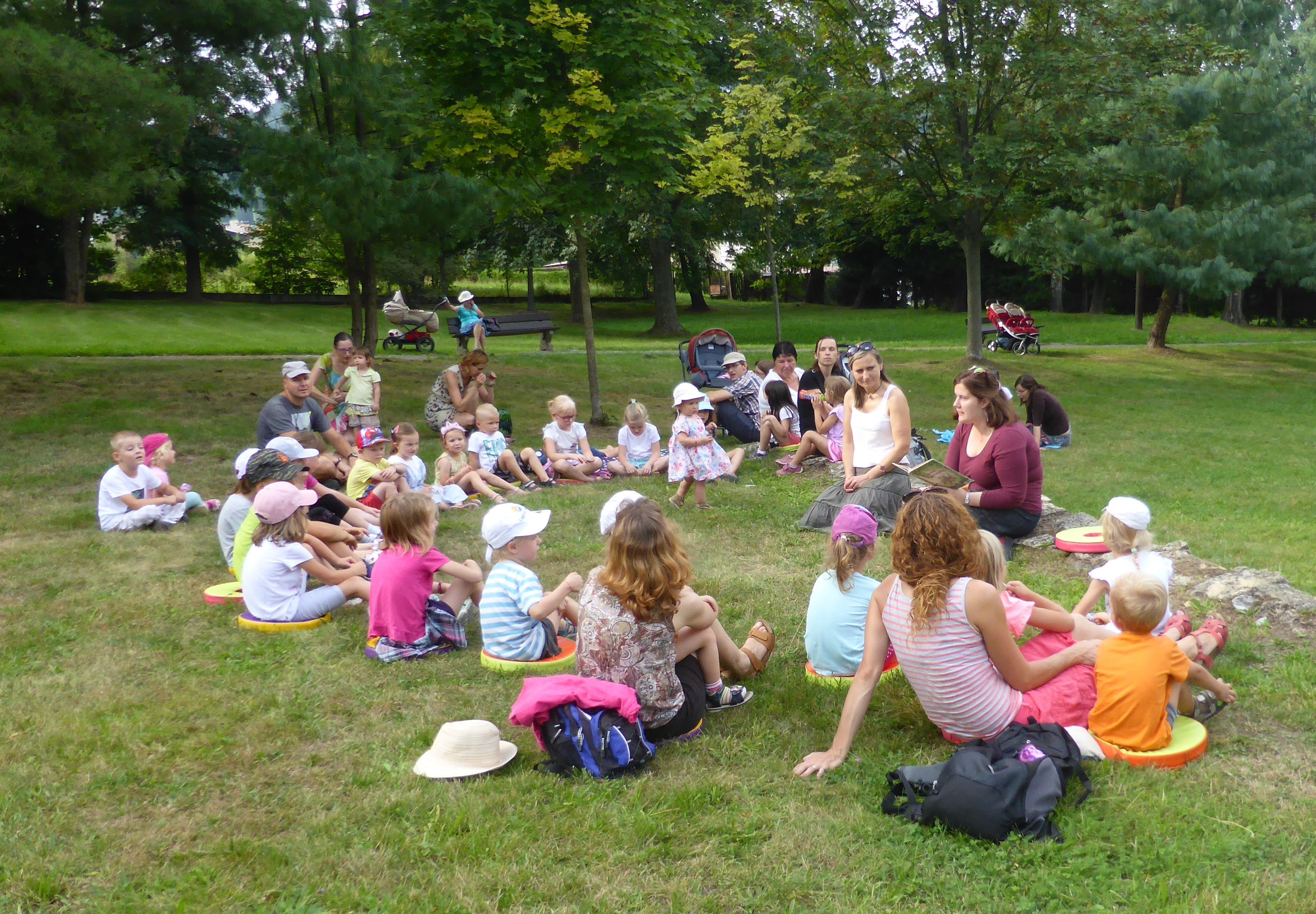 Čtení a vyprávění příběhů pro mladší školní děti v městském parku Javorka.